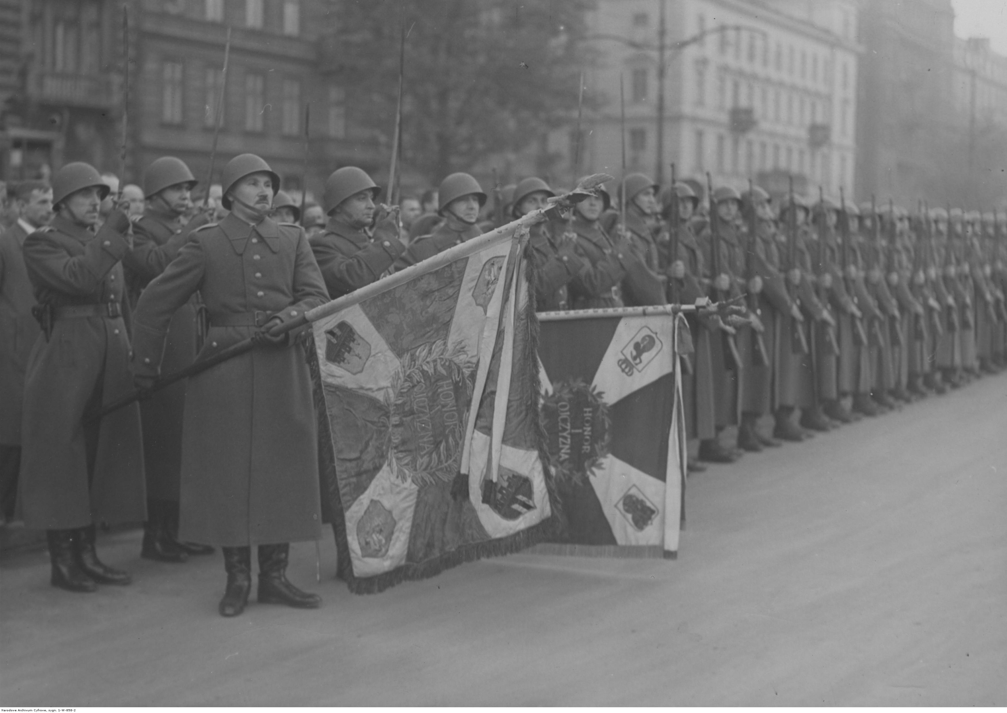 Przekazanie sztandaru Szkoły Podchorążych dla Podoficerów w Bydgoszczy do Muzeum Wojska Polskiego w Warszawie. Sztandar Szkoły i kompania honorowa przed Dworcem Głównym. Koncern Ilustrowany Kurier Codzienny - Archiwum Ilustracji. Sygnatura: 1-W-858-2